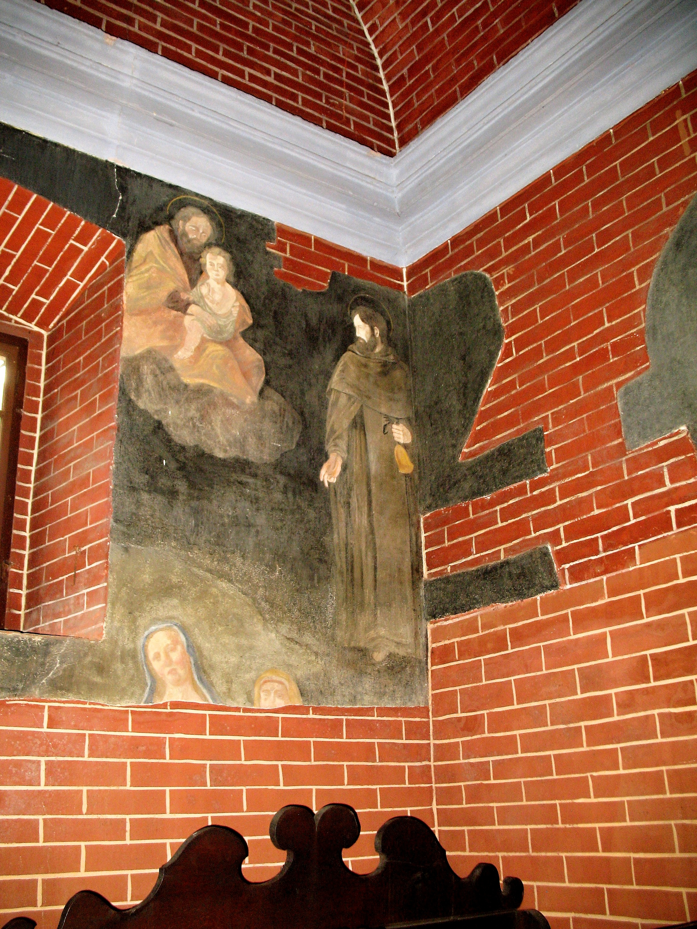 Loreta v areálu augustiniánského kláštera v České Lípě